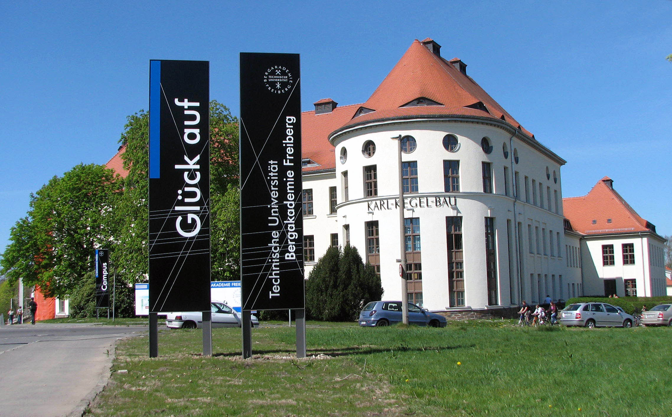 Begrüßungstafel auf dem Campus der Technischen Universität Bergakademie Freiberg